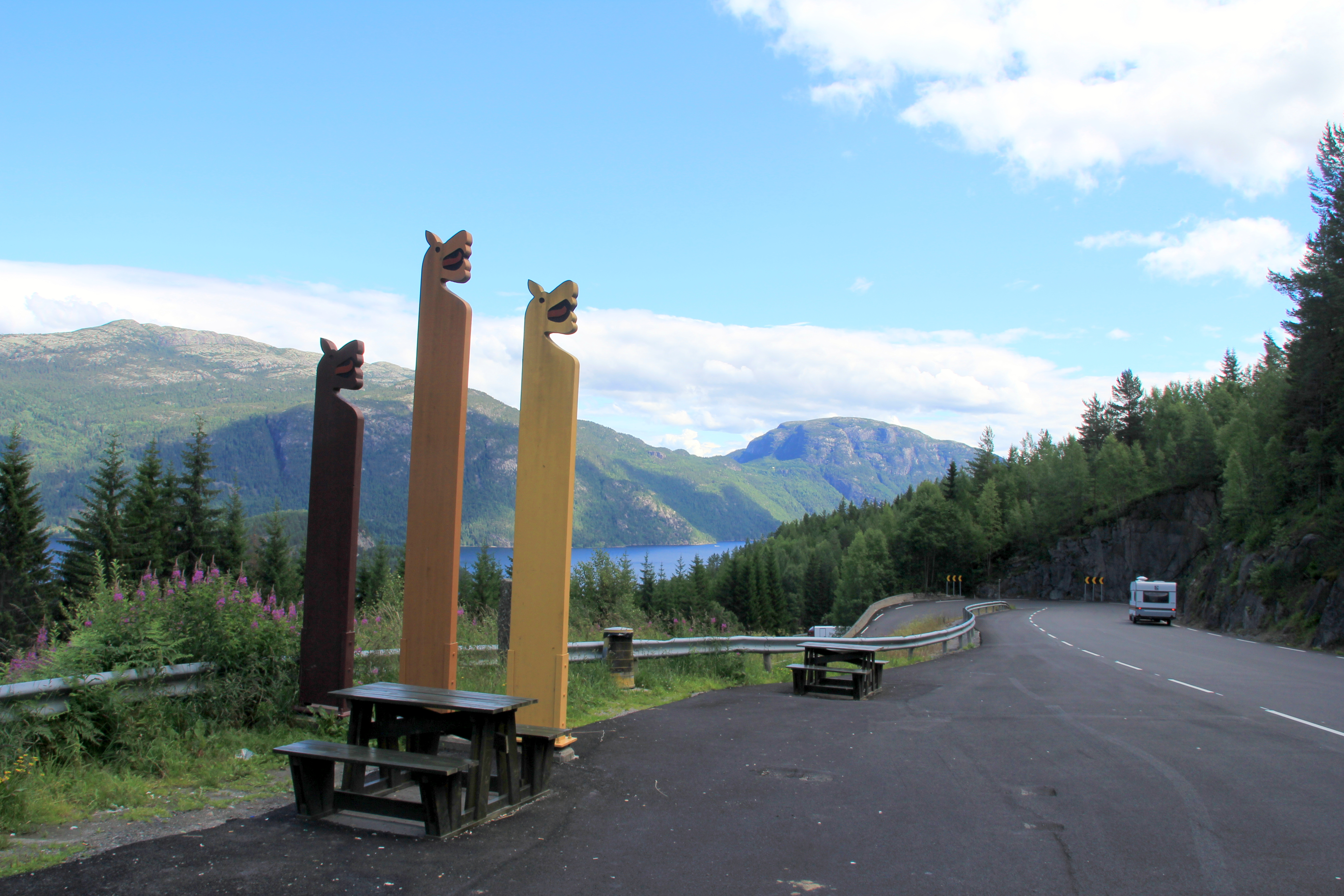 Kviteseidkleiva, mellom Kviteseid og Vrådal på riksvei 41 (Rv41). Telemarksveien går mellom Brunkeberg i Kviteseid og Timenes i Kristiansand.